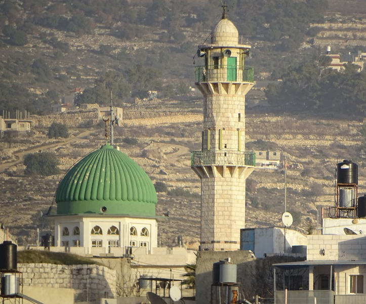 يوجد المسجد العمري القدي غربي البلدة القديمة